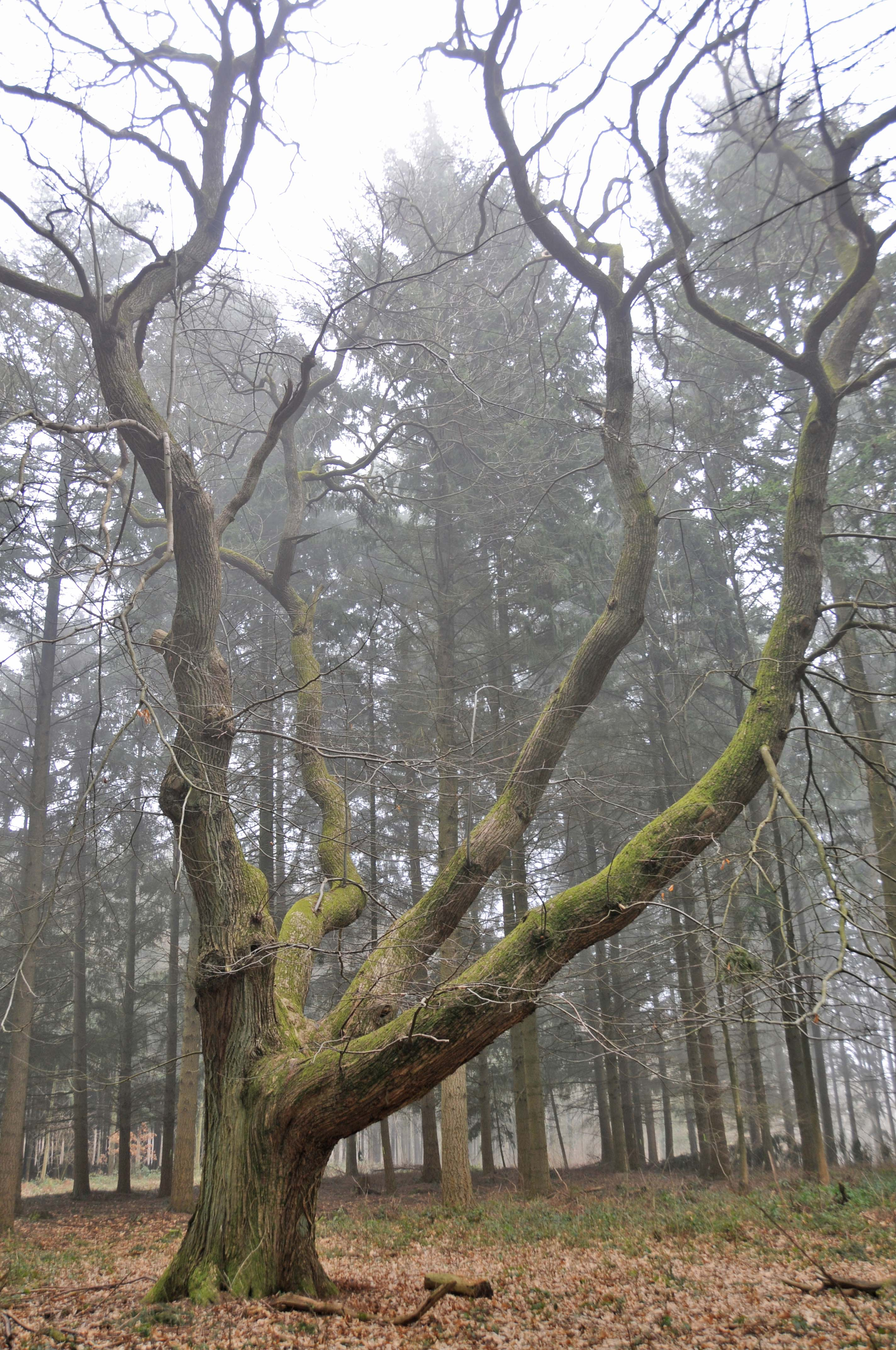 Séisskäschtebam um Scheedhaff.